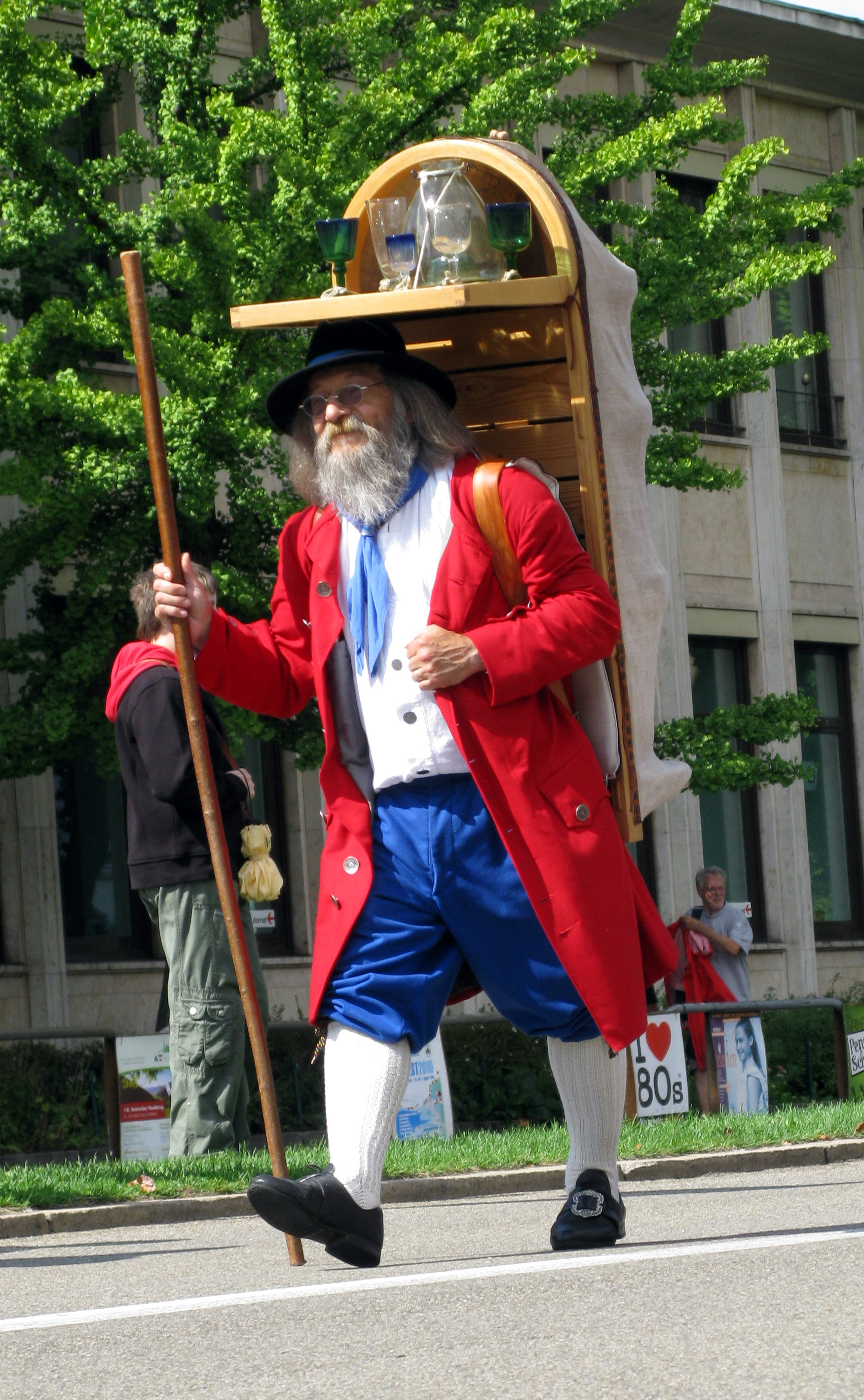 Festumzug beim Deutschen Wandertag 2010 in Freiburg, Glasträger